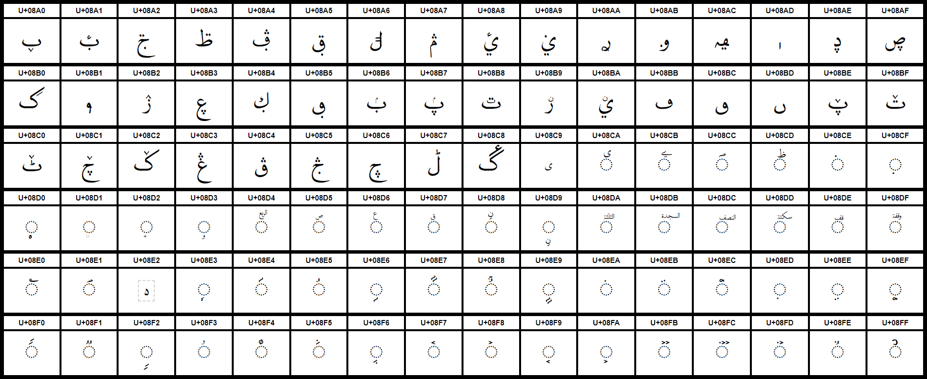 Grafiktafel für den Unicodeblock Arabisch, erweitert-A. Schraffierte Felder sind unbesetzte Codepoints, graue Felder sind bisher fehlende Zeichen.